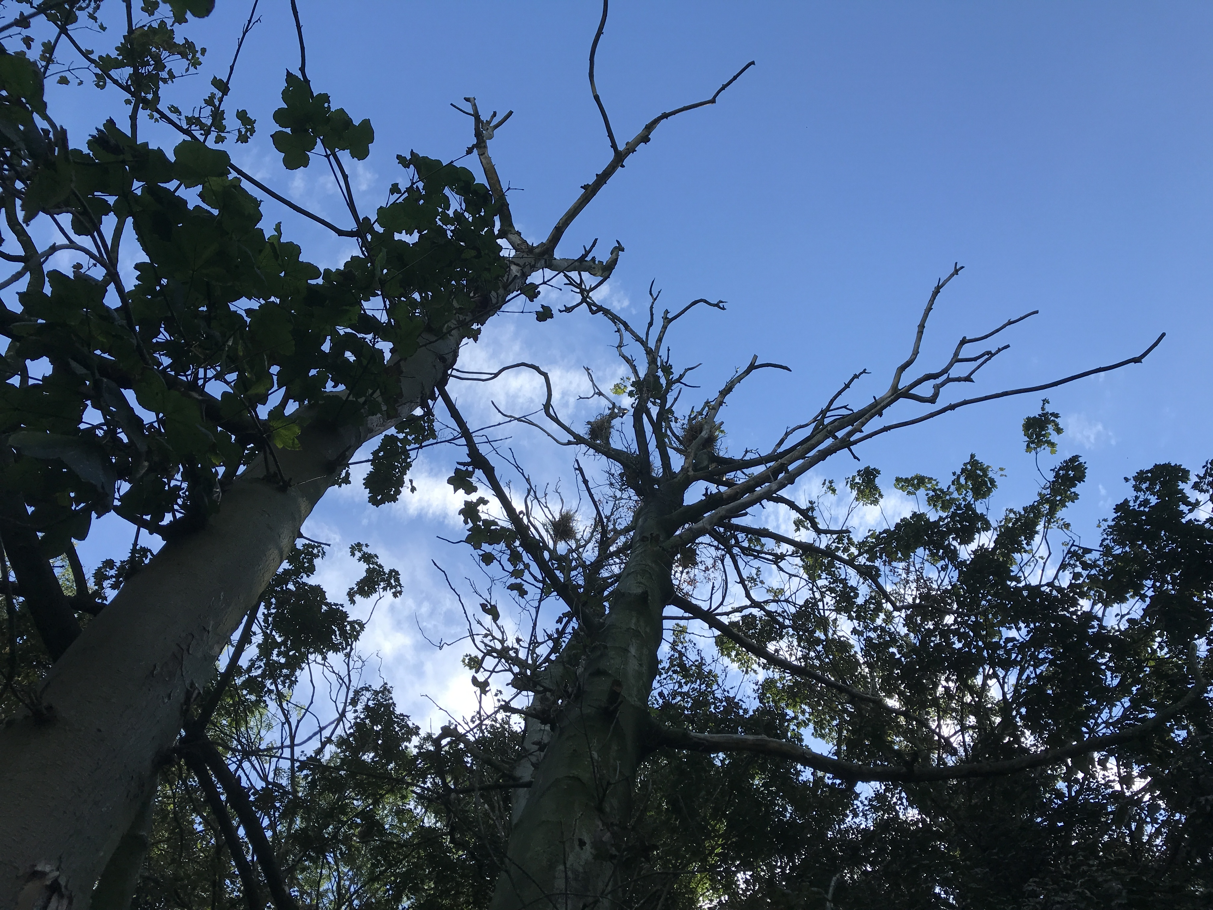 Naturschutzgebiet Kormorankolonie bei Niederhof in Mecklenburg-Vorpommern